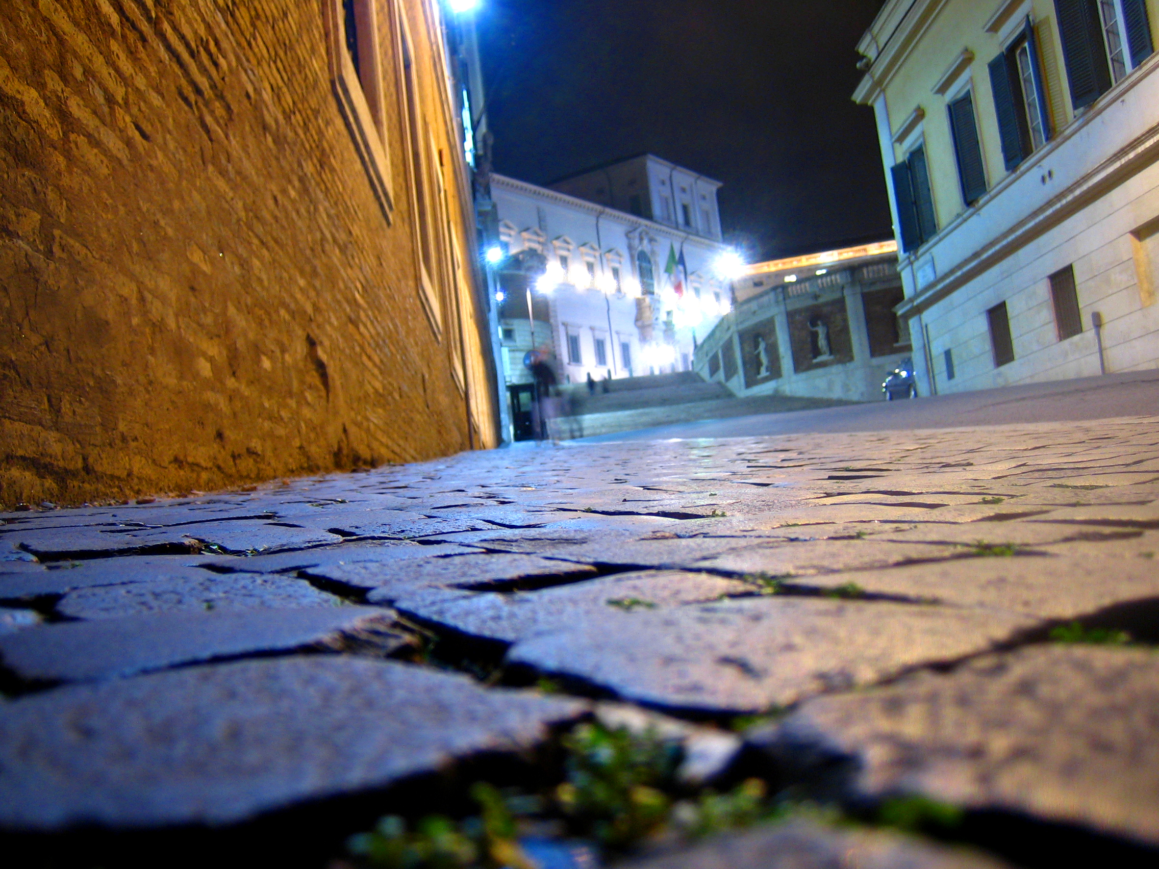 Quirinale, Roma, Italia